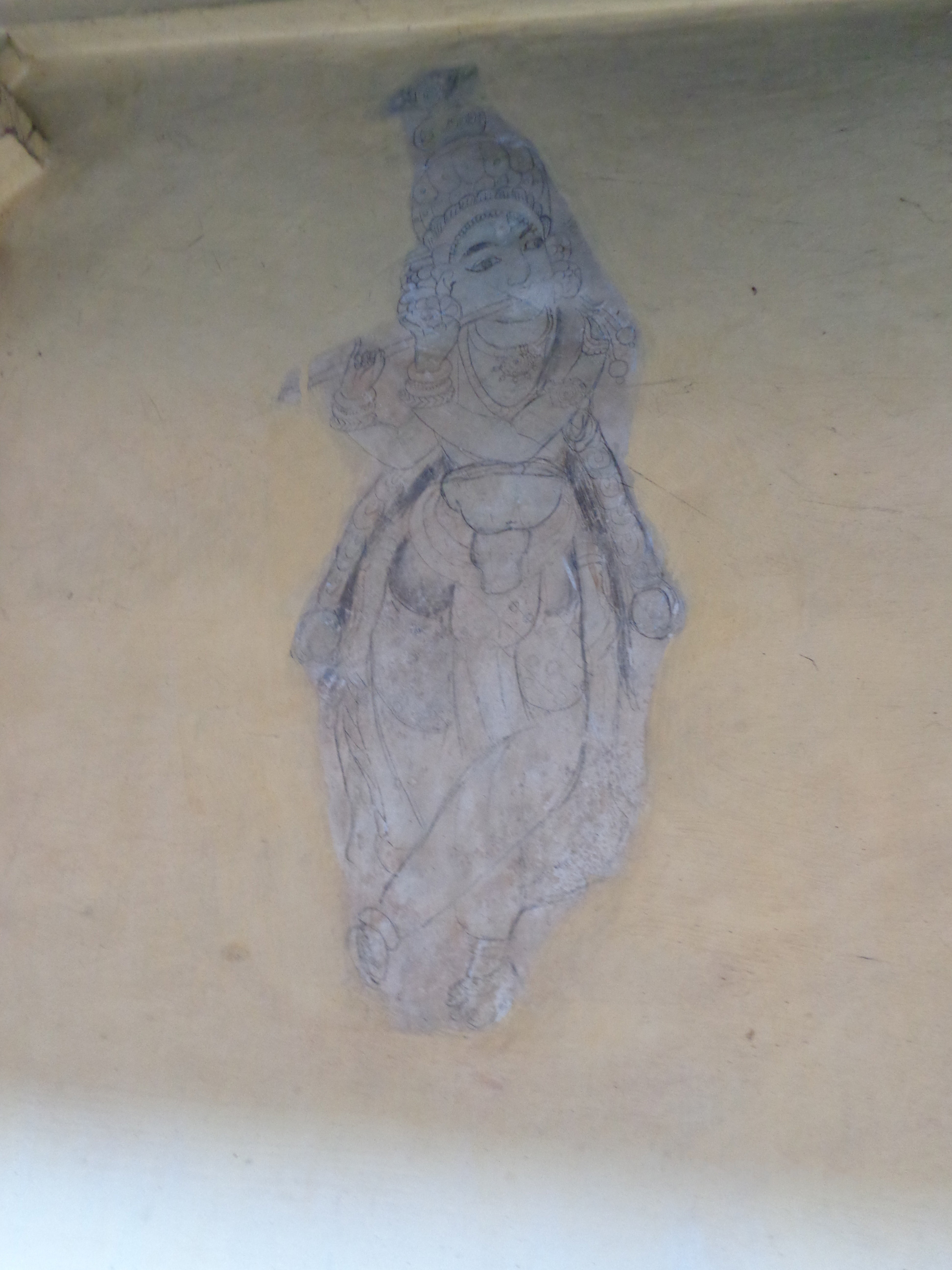 karikkkad subrahmanya temple- sreekrishana picture in the wall of ayyappa by kuttikrishnamarar, famous malayalam literary critic